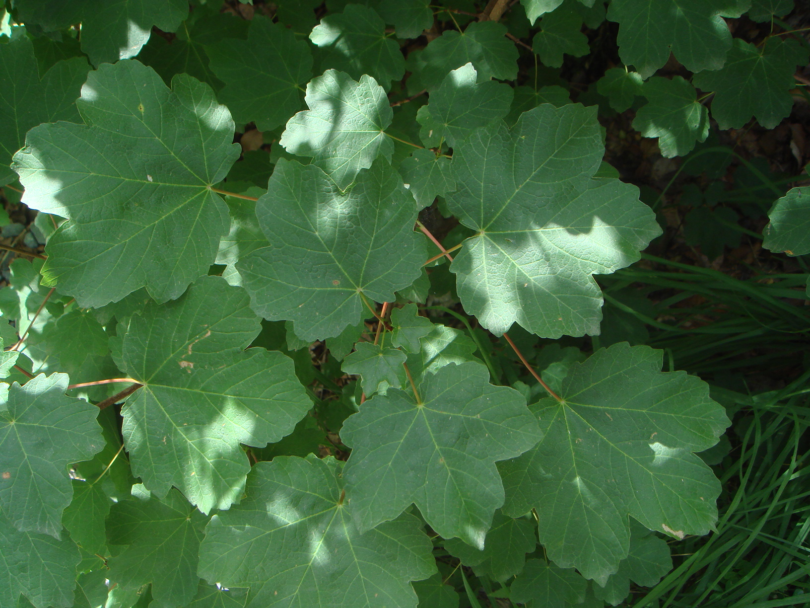 Acirón (Acer opalus subsp. opalus), Valle de Añisclo, Pirineos, (Huesca), España.